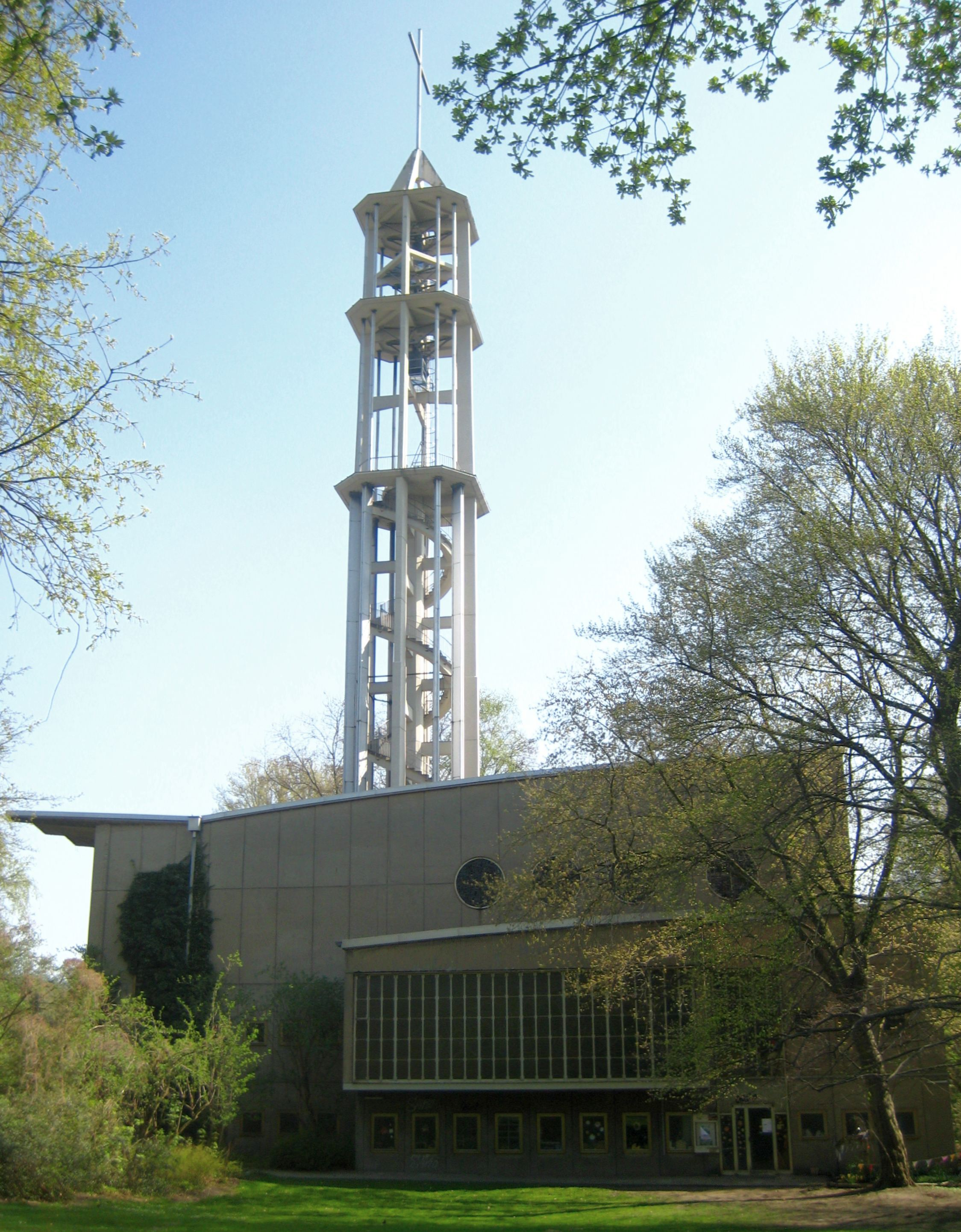 western side of Emperor Friedrich Memorial Church (Kaiser-Friedrich-Gedächtniskirche) in Hansaviertel in Berlin, built in 1957